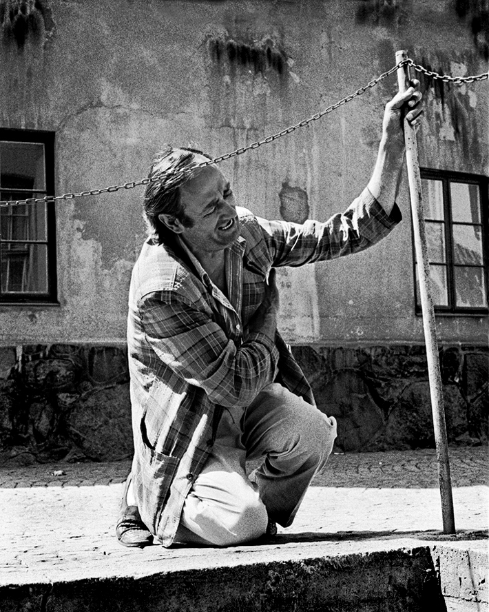 Autentisk bild av en man som får en hjärtinfarkt i Malmö 1988. (Mannen överlevde)